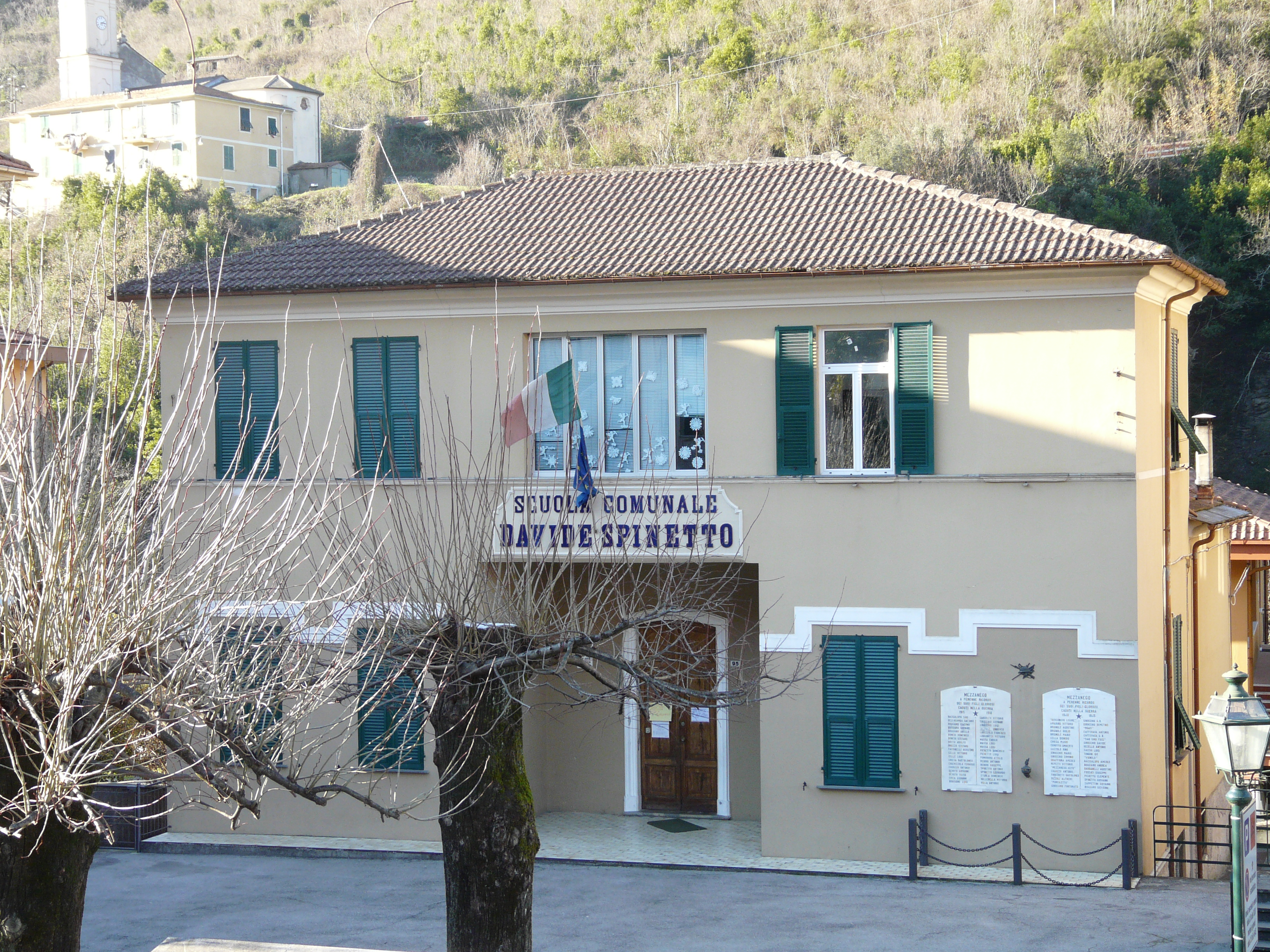 Scuola Comunale Davide Spinetto, Comune di Mezzanego, Liguria, Italia